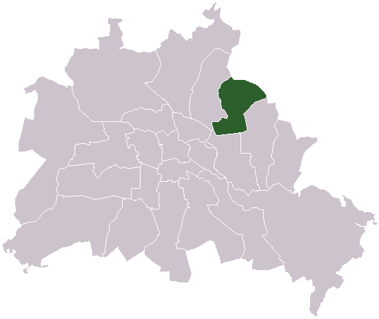 Lage des ehemaligen Bezirks Hohenschönhausen in den Grenzen Berlins